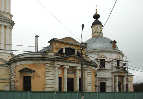 Коломна. Церковь Вознесения